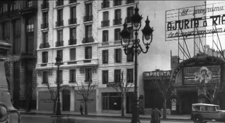 Toma de la Avenida Rivadavia al oeste de la calle Montevideo, desde la Plaza Congreso de Buenos Aires. Se ve a la derecha el antiguo Cine Plaza Congreso, luego Cine Gaumont, y tres edificios de vivienda.